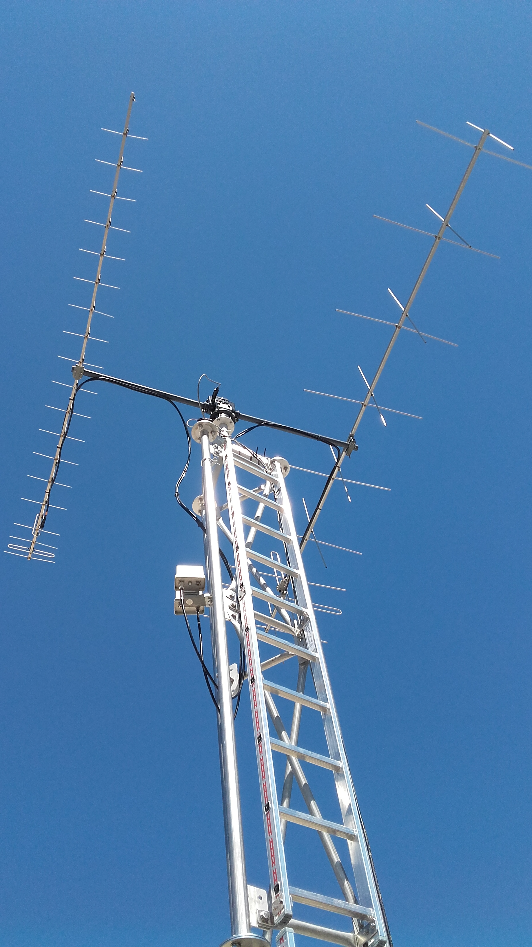 antenne présente dans le Centre spatial universitaire Montpellier-Nîmes